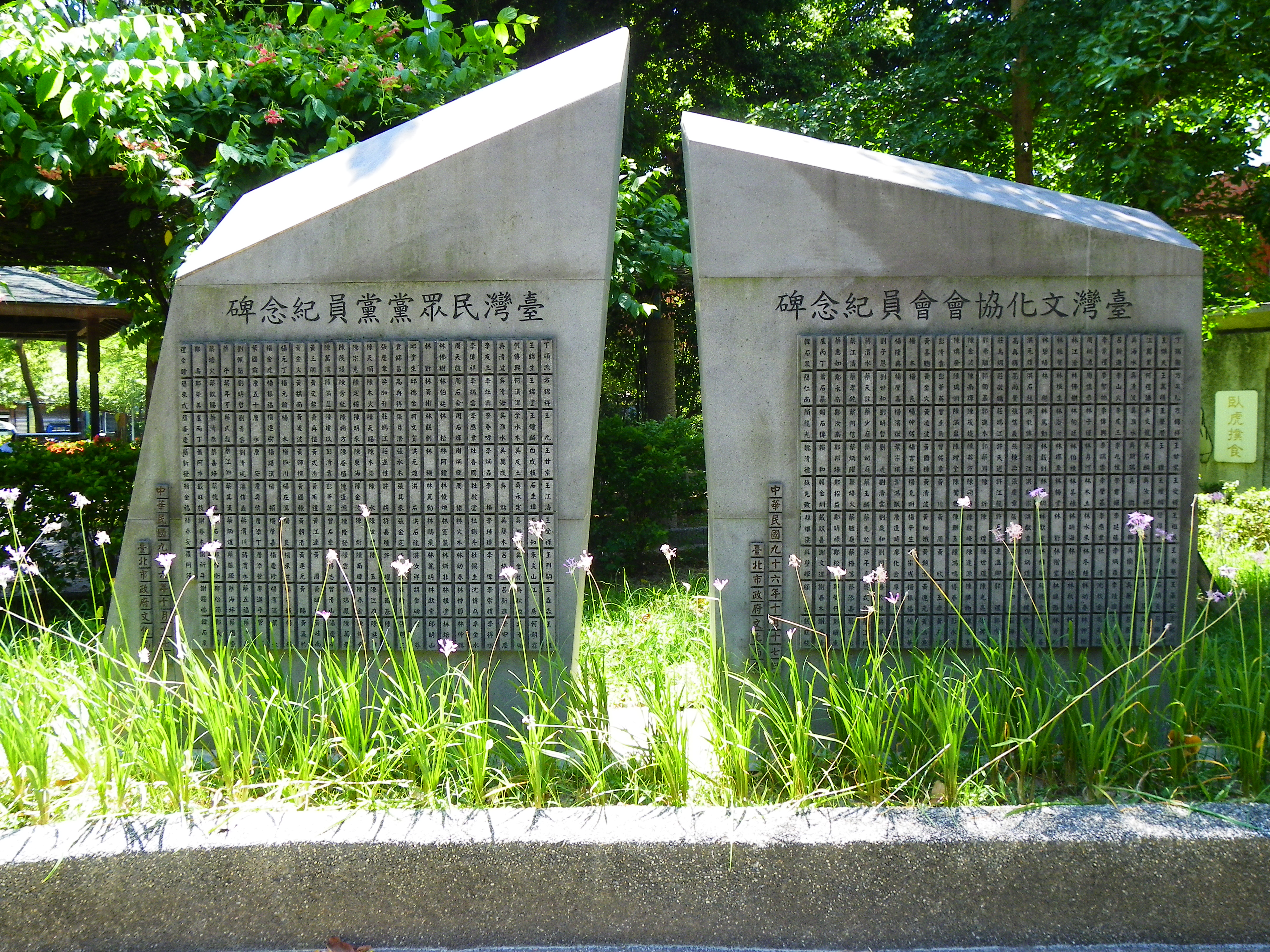 中文（台灣）: 臺灣文化協會會員紀念碑與臺灣民眾黨黨員紀念碑，2007年10月17日臺北市政府文化局立。